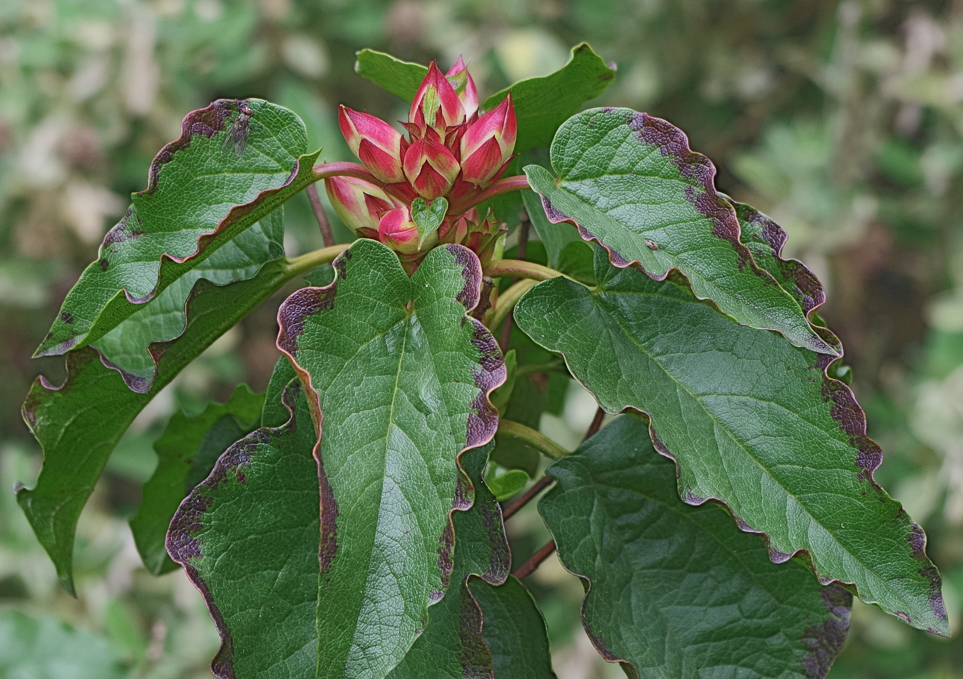 Cistus populifolius - Kew Gardens